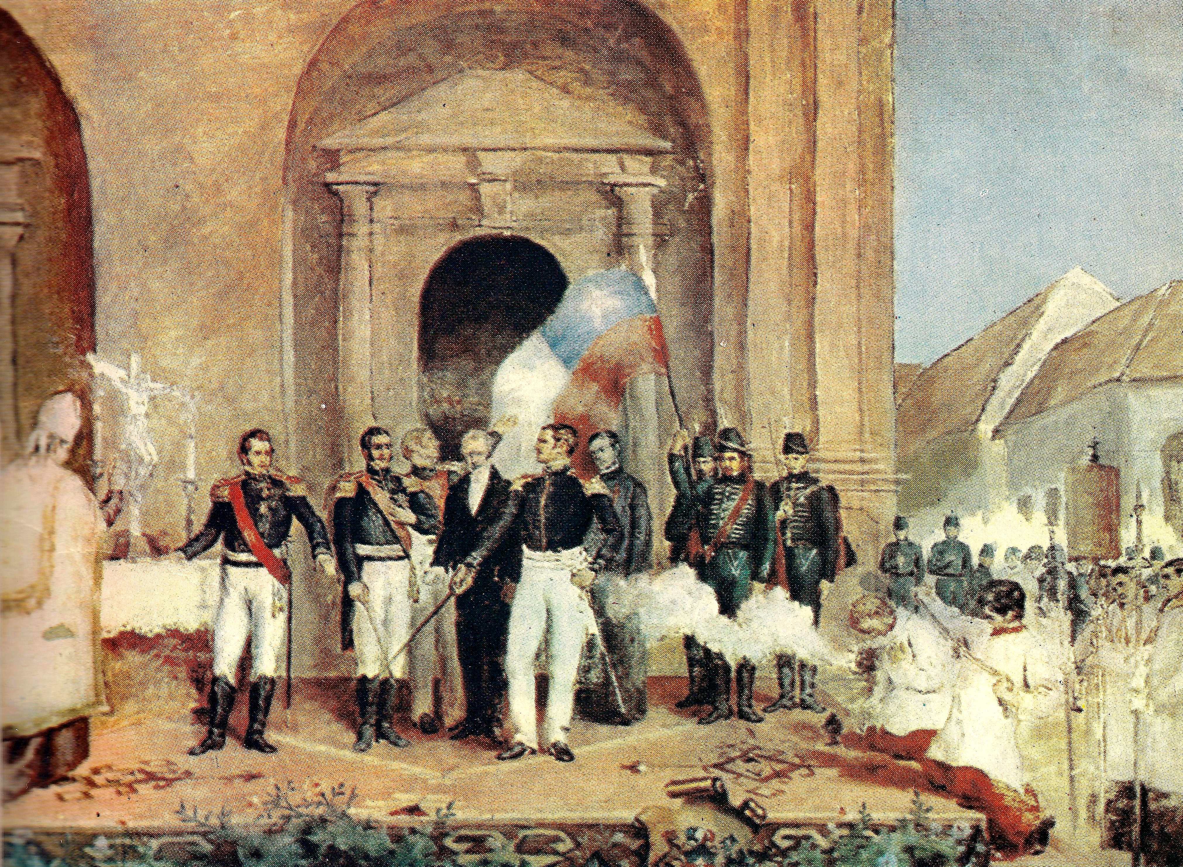 Jura de la Independencia de Chile. Obra de Cosme San Martín (1850-1906).